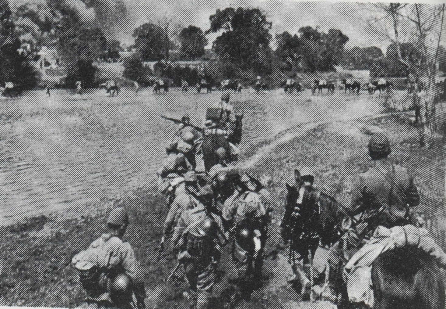 錦江作戦で泗水を渡河する野砲兵第34連隊（1941年）